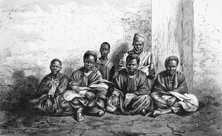 L'Ecole des Otages créée par Faidherbe à Saint-Louis du Sénégal (Louis Faidherbe, Le Sénégal : la France dans l'Afrique occidentale, Between pages 366 and 369